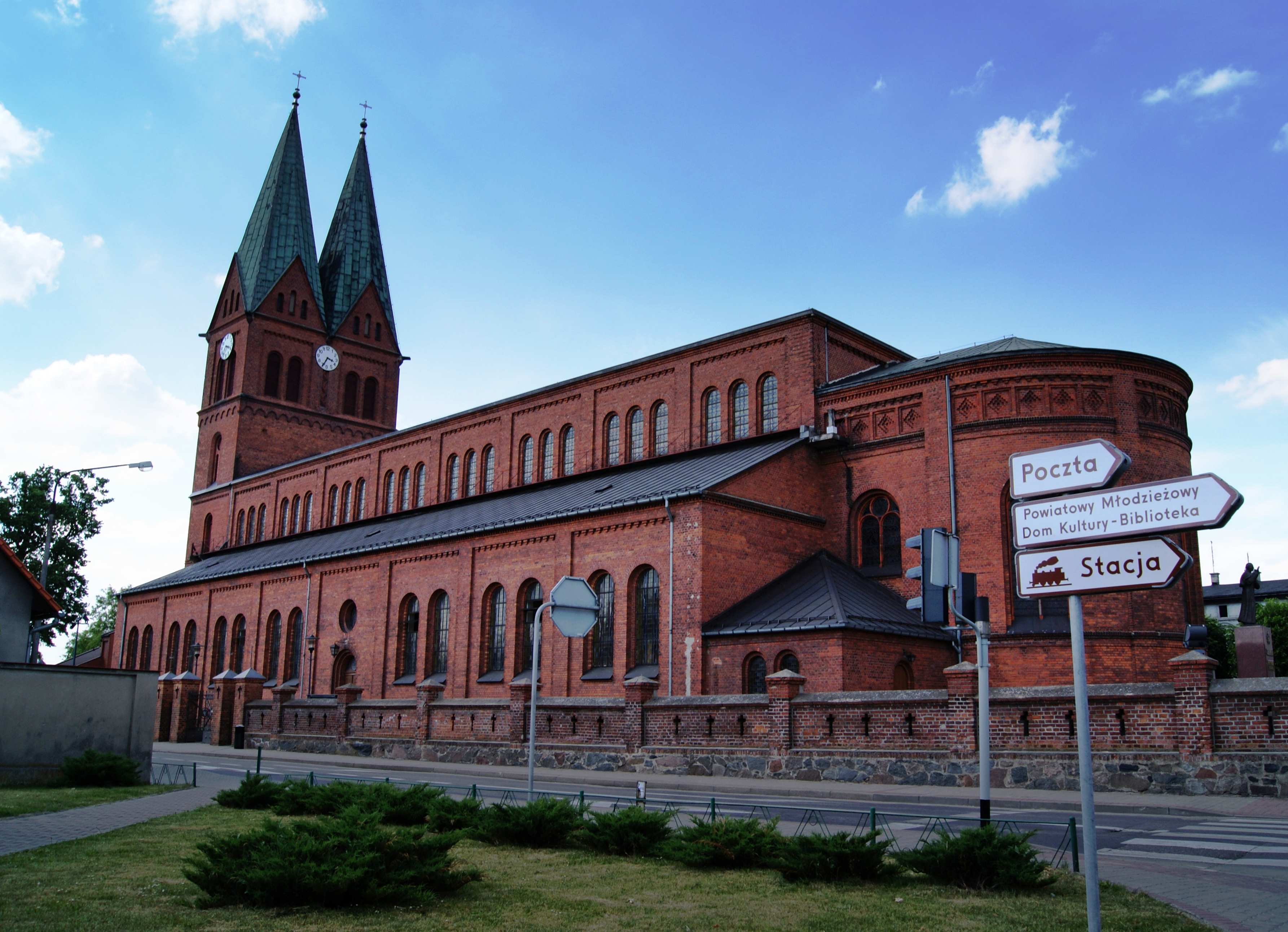 Kościół parafialny p.w. Wszystkich Świętych